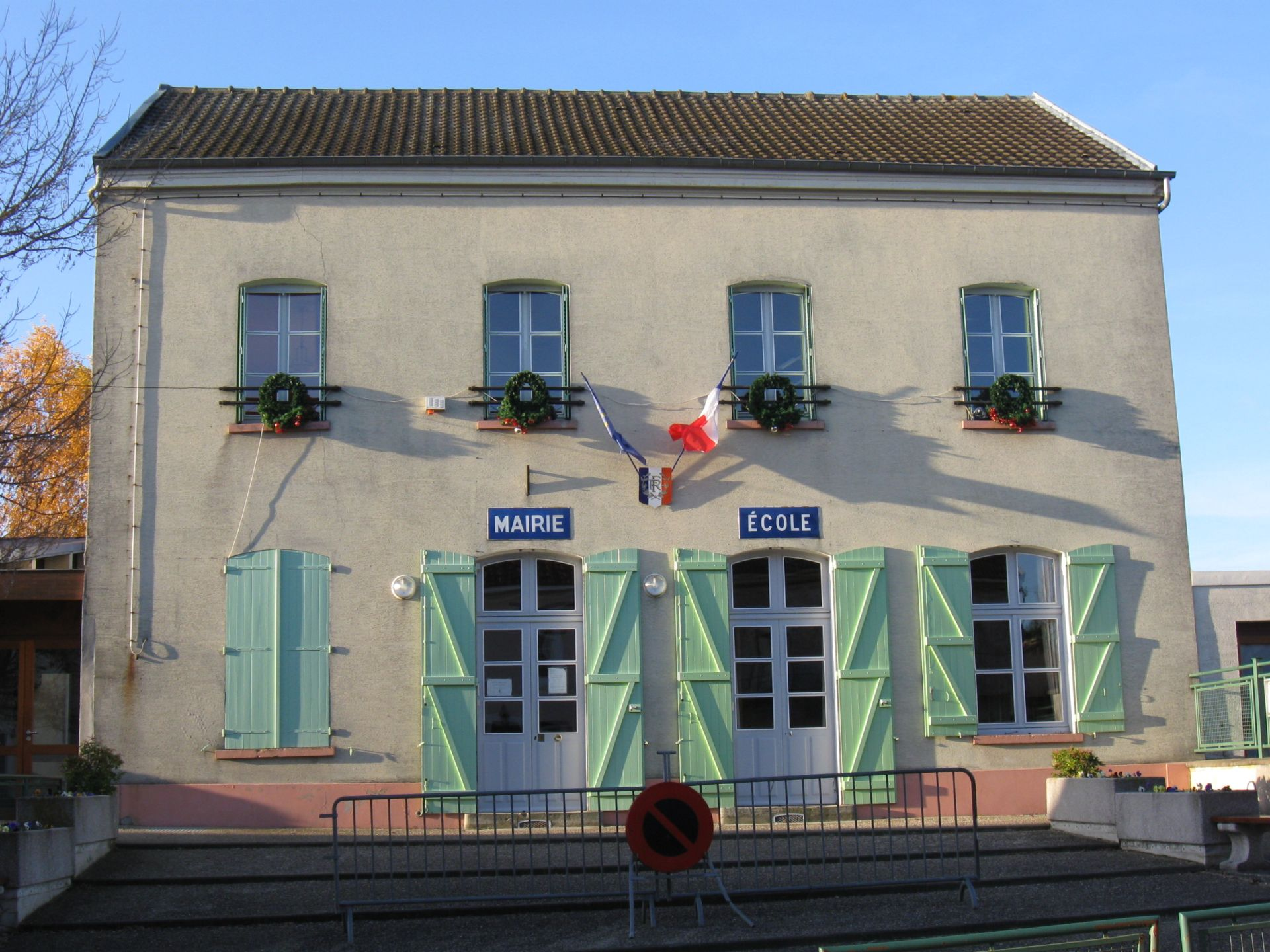 Mairie-école de Saint-Fiacre (Seine-et-Marne, région Île-de-France).